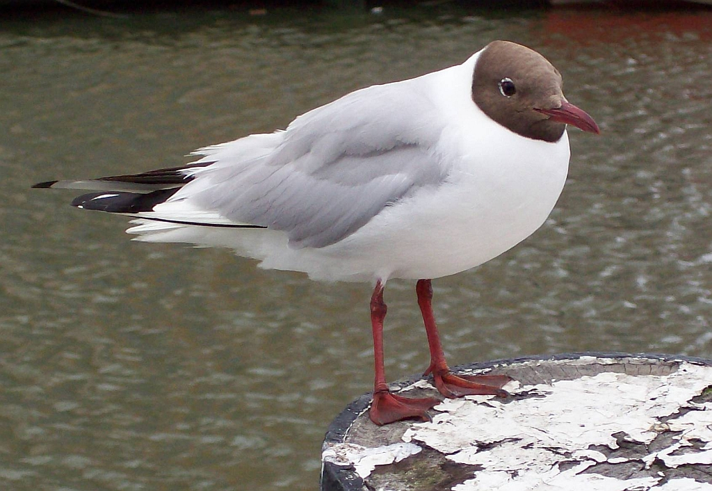 Larus ridibundus (Lachmöwe), Büsum (Germany)